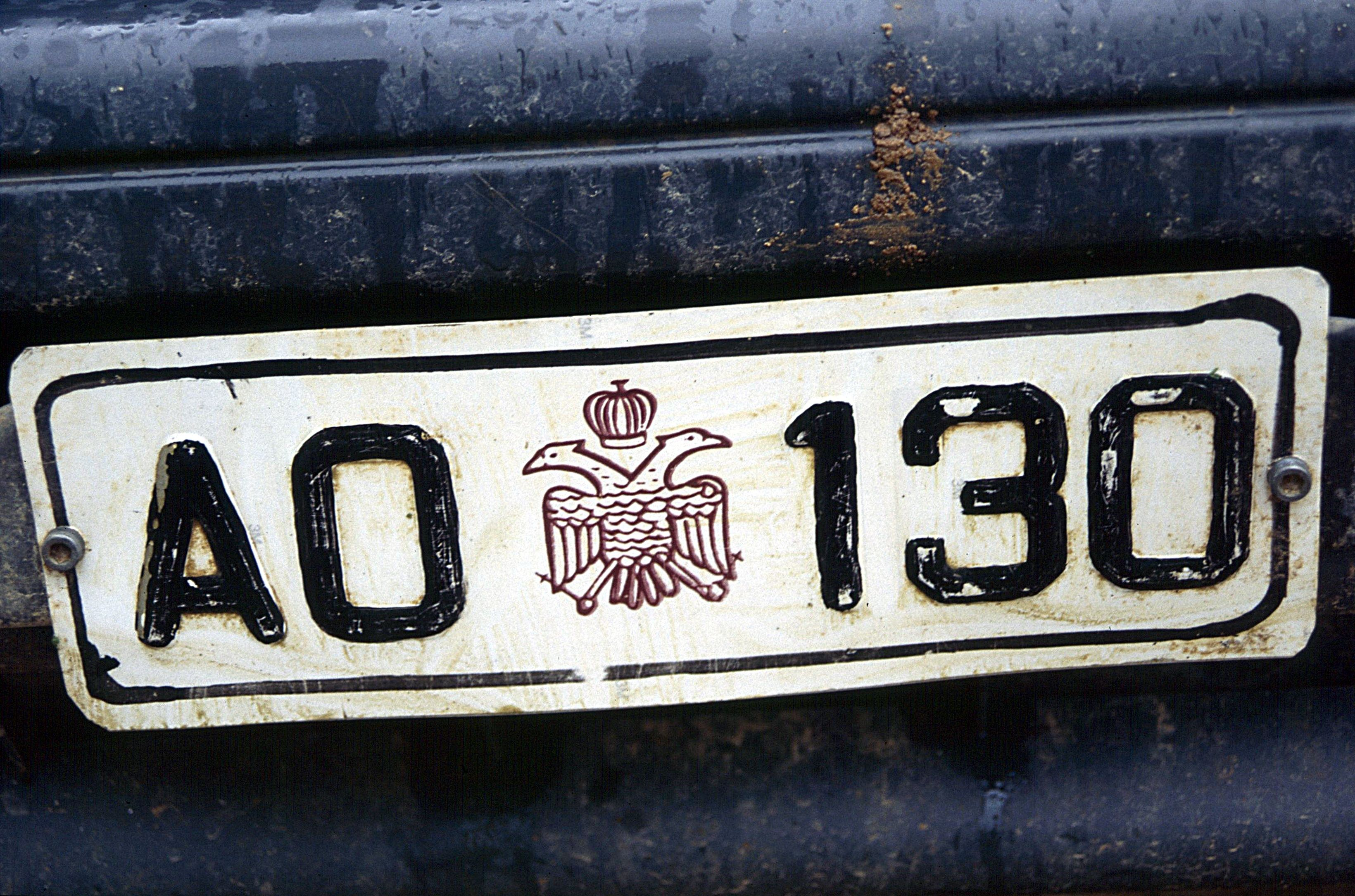 Kraftfahrzeugkennzeichen der Republik Athos